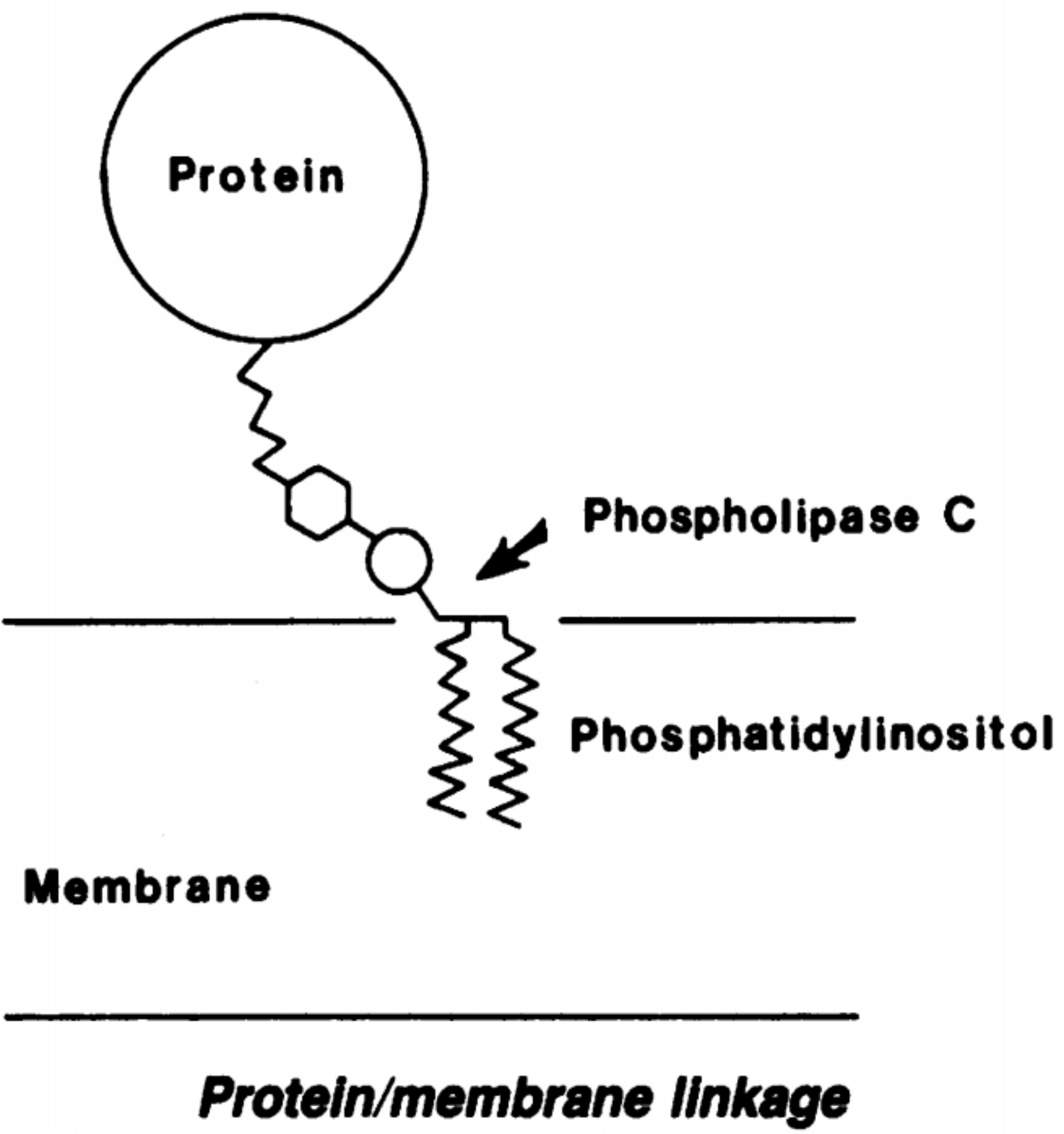 Cхема, которую предоставил Мартин Лоу для очерка Джины Колаты в Science